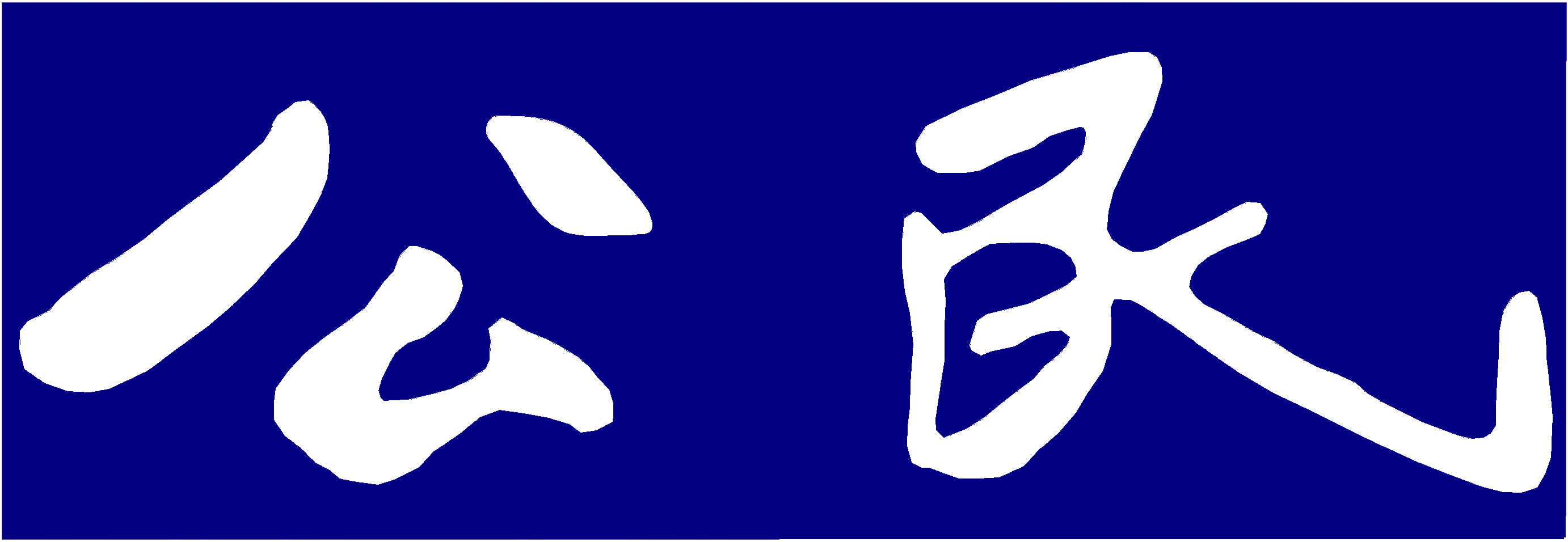 中文（中国大陆）: 公民标识，孙中山手迹